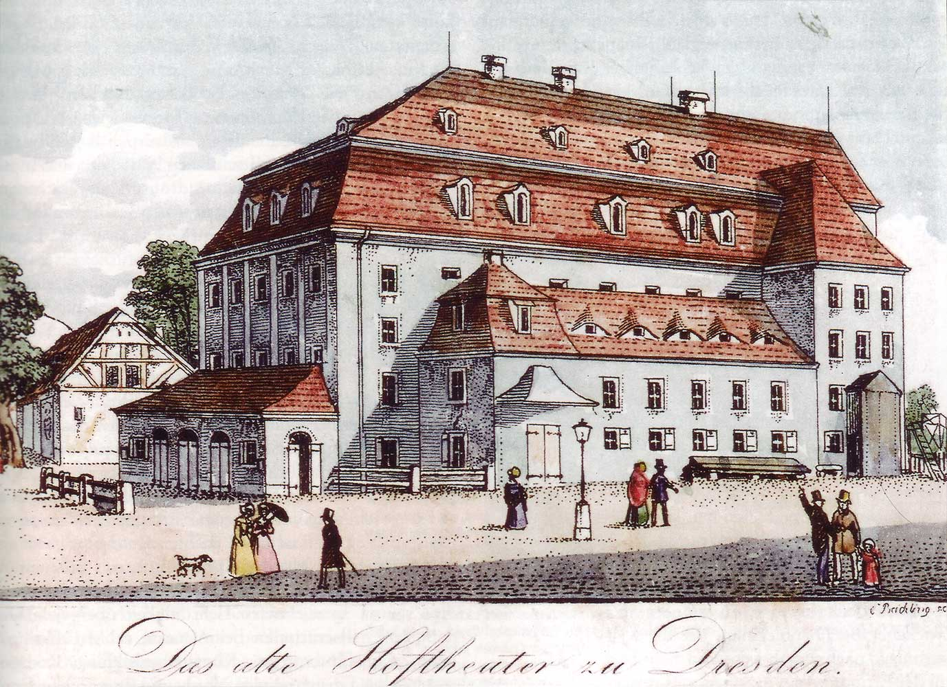 Kleines Hoftheater in Dresden, 1820, nach einer kolorierten Lithographie von Carl Heinrich Beichling